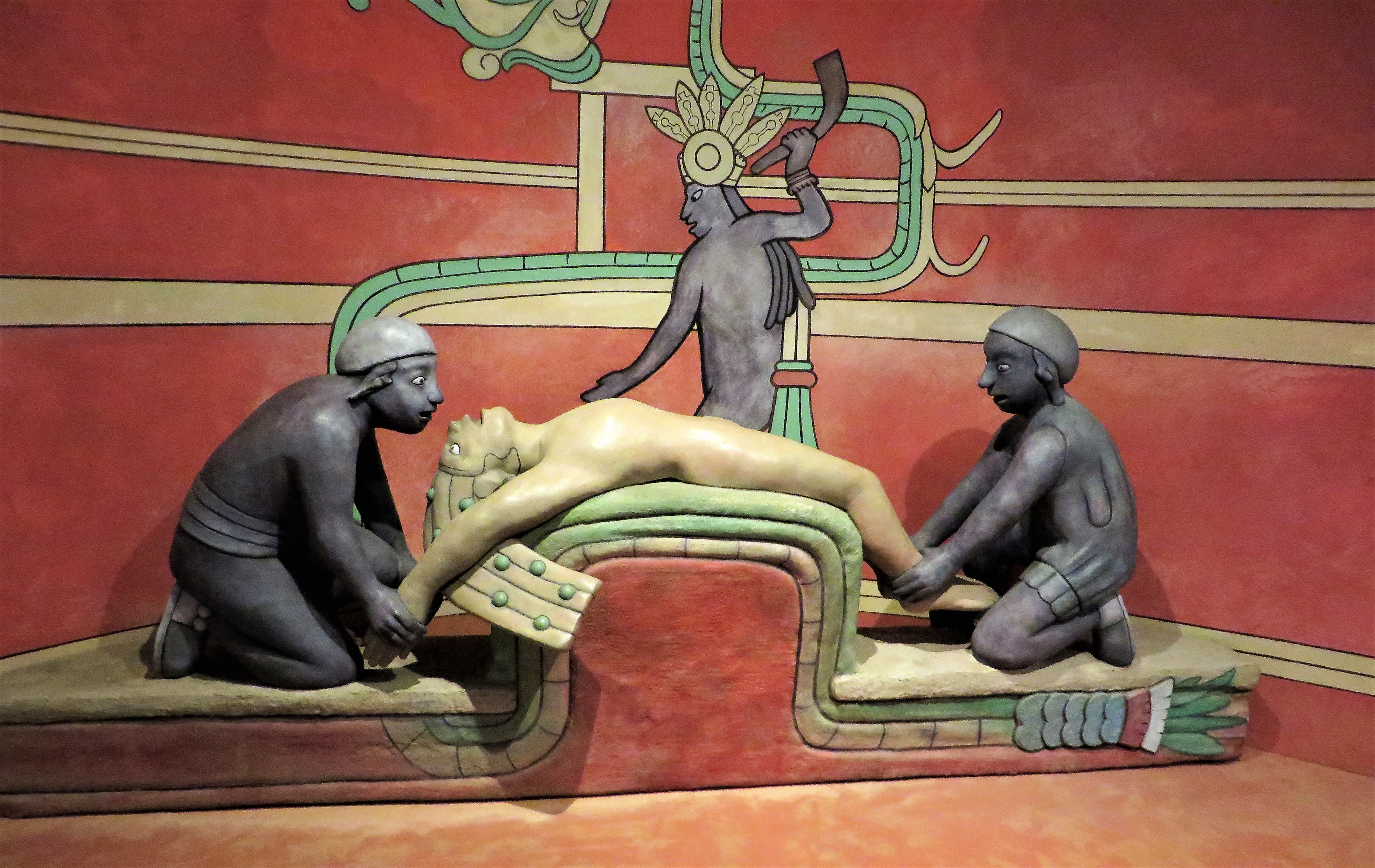 Anschauungsobjekt im Museum Guimar (Teneriffa)